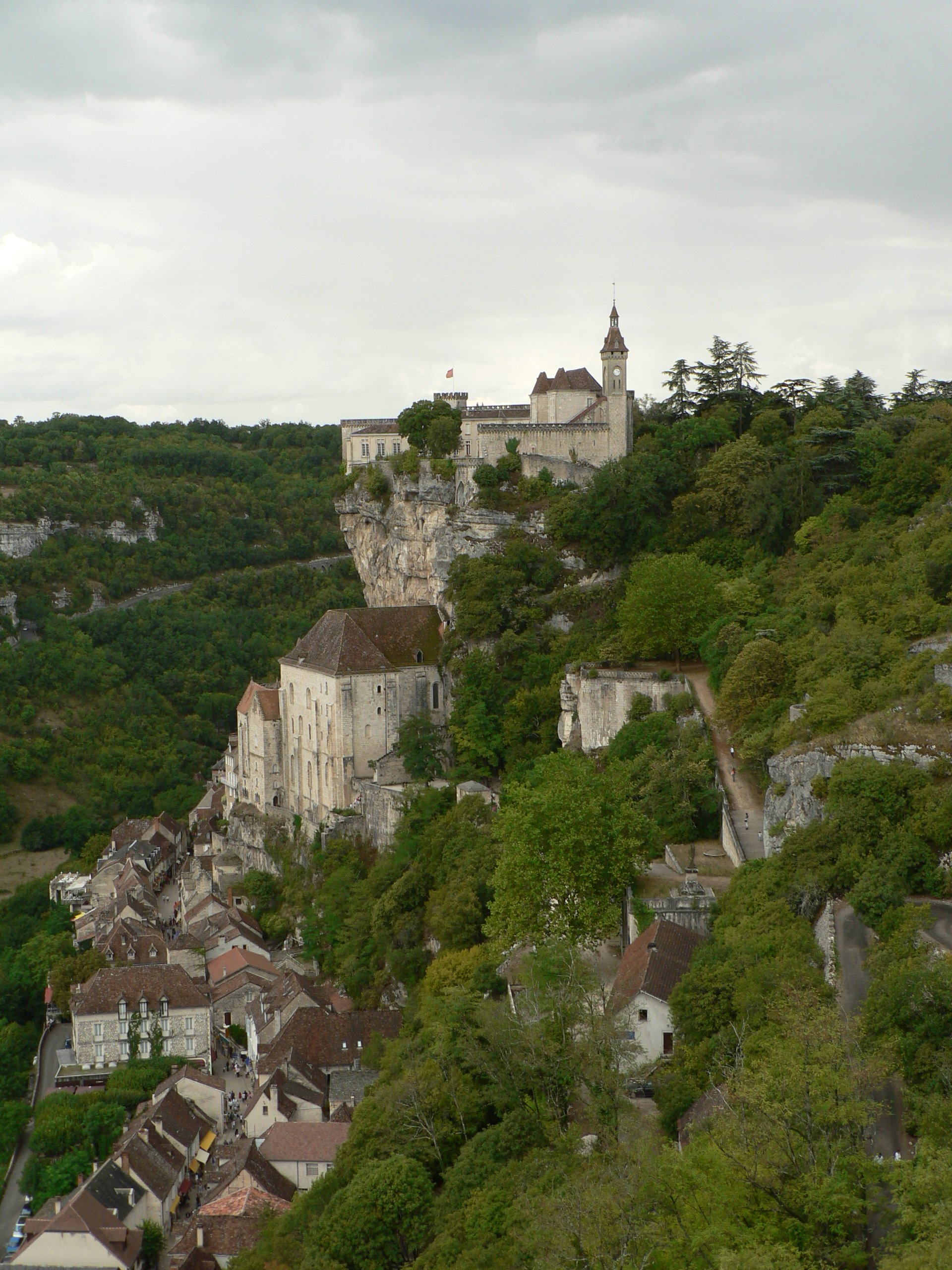 Rocamadour (France) vue générale par temps gris